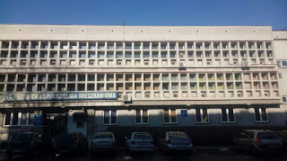 Rybnik Spółdzielnia Mieszkaniowa